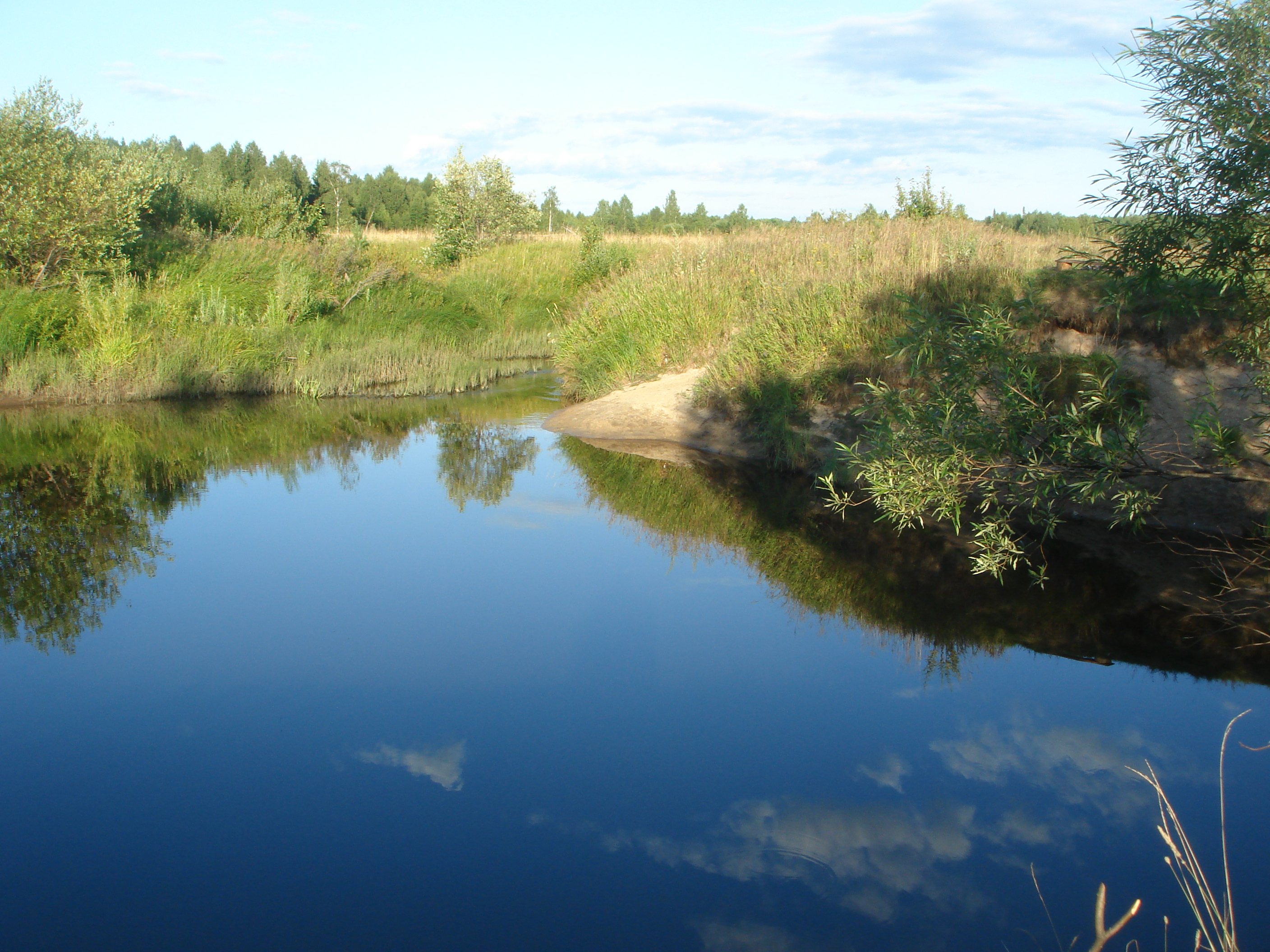 Река Шуда, приток Ветлуги.